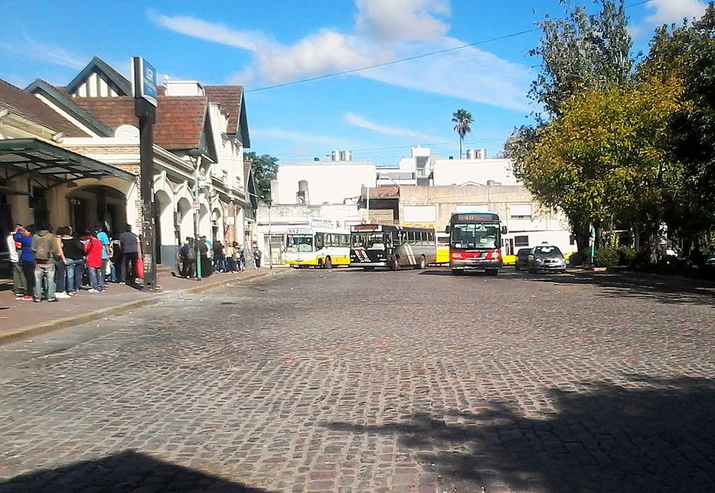 Terminal de colectivos. Línea 552 Línea 541 Línea 548